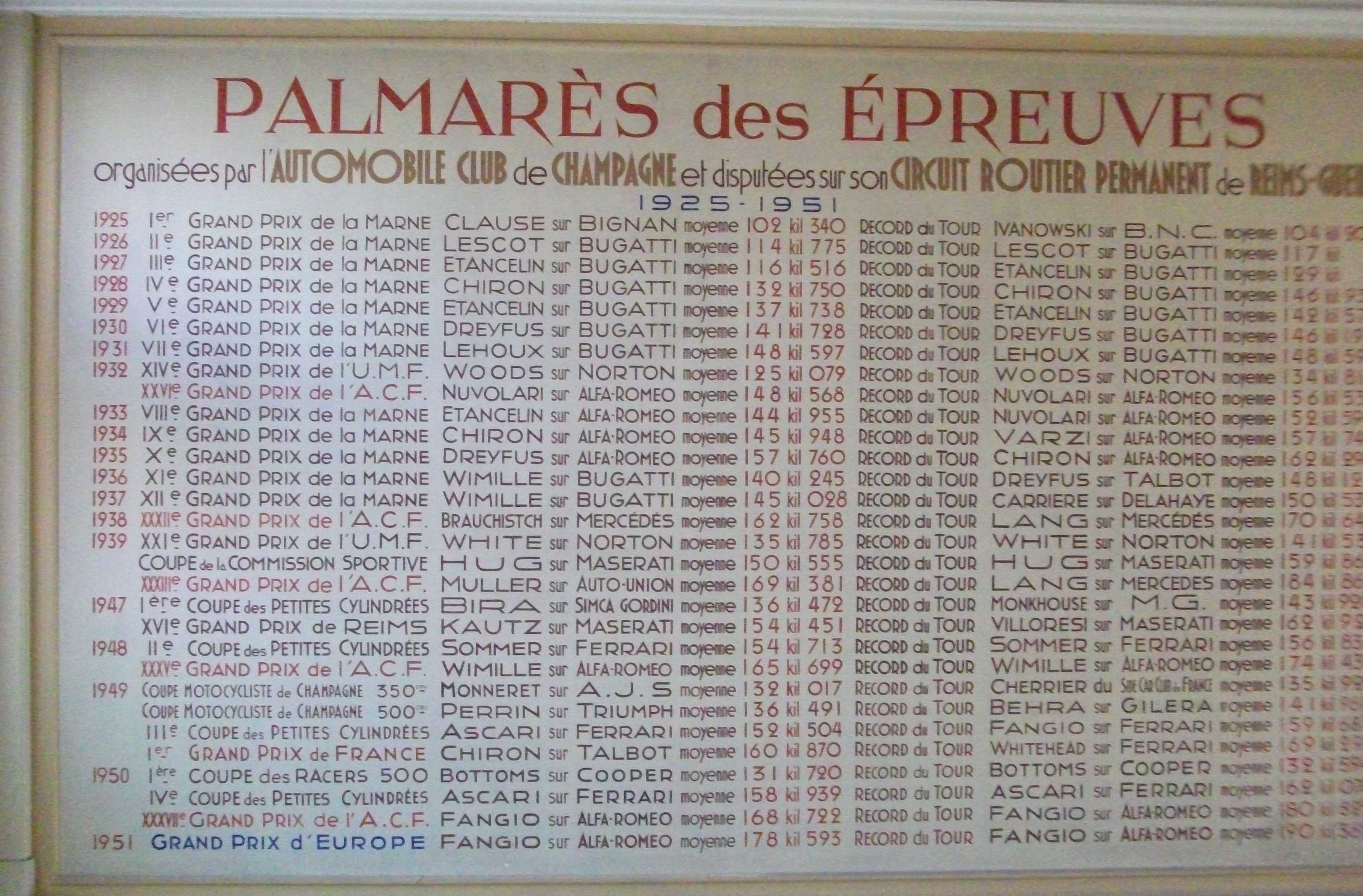 fresque du palmarès, au siège de l'Automobile_club_de_Champagne_de 1925 à 1951.